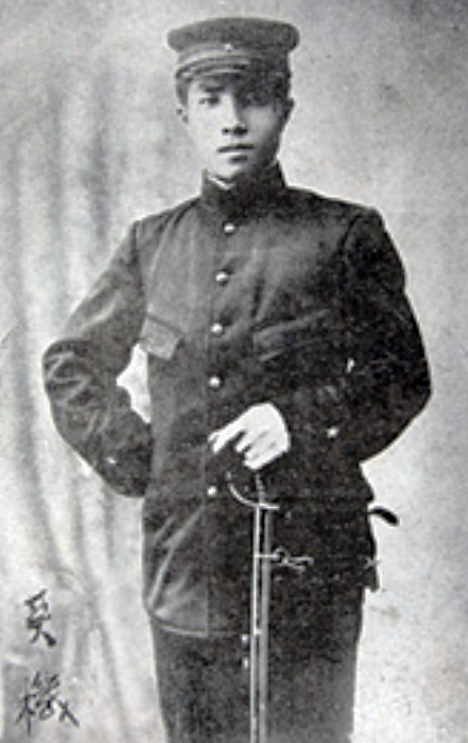 Young Hideki Tojo.